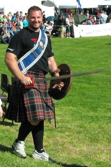 Gregor Edmunds.